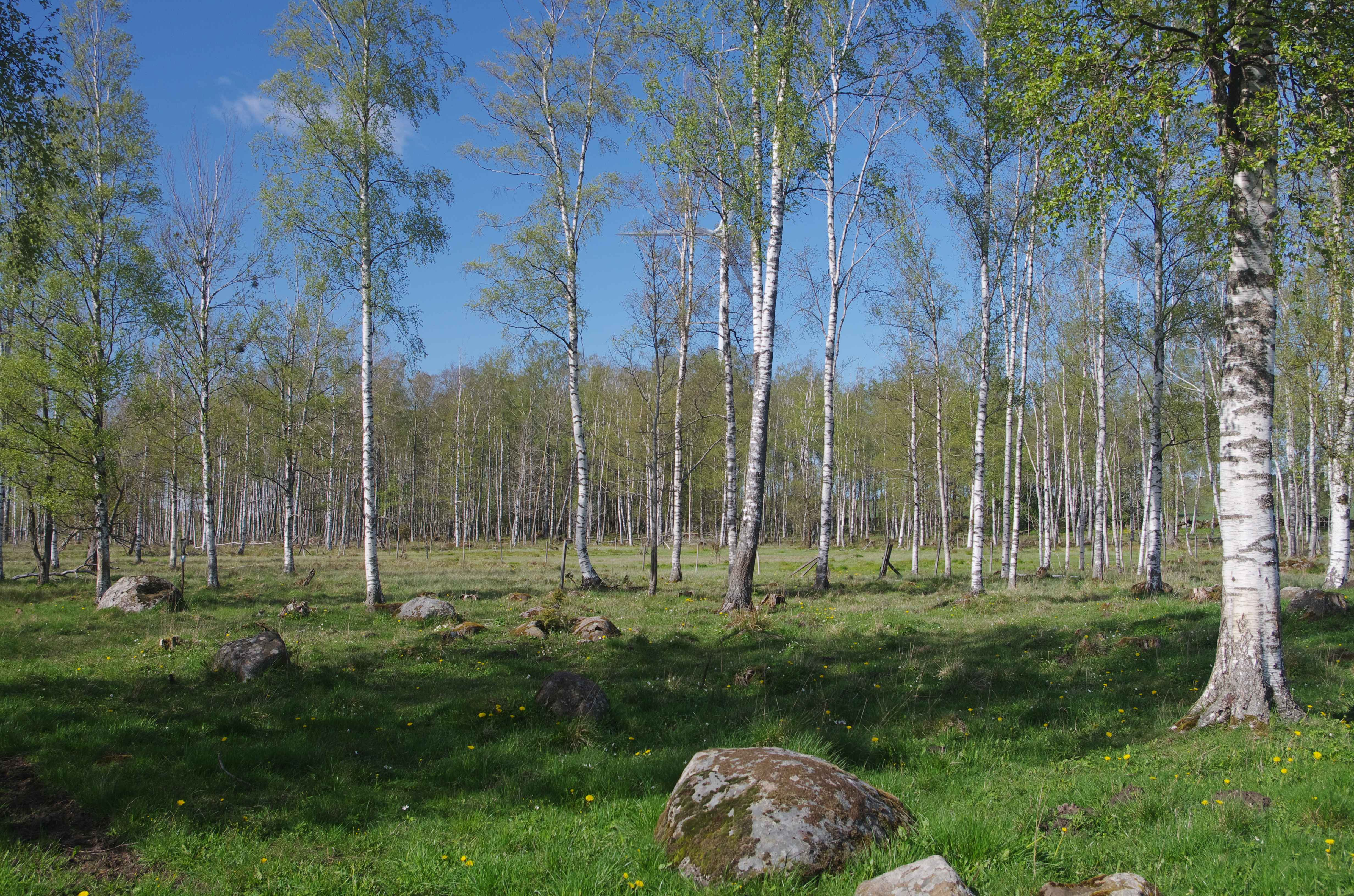 Strömslunds naturreservat eller ibland Dimbo naturreservat i Falköpings kommun i Västergötland i Sverige. Naturreservatet ligger inte i Dimbo socken (som man skulle kunna tro av namnet), utan i Skörstorps socken.